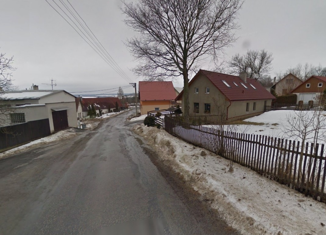 Česky: část obce zvaná Horní Prosíčka